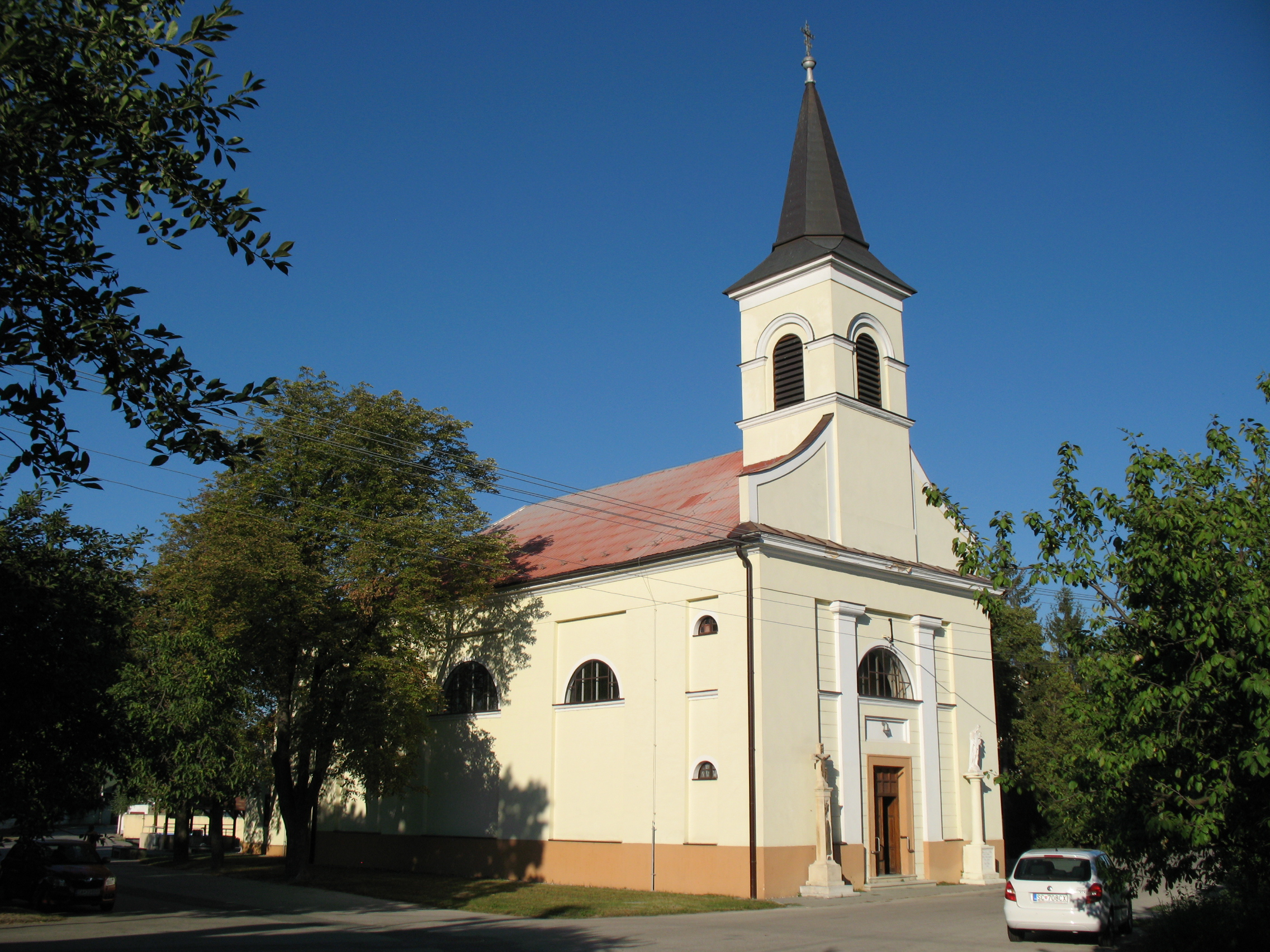 Vághosszúfalu